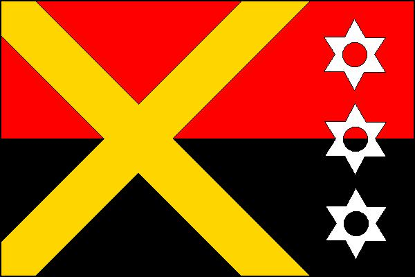 Vlajka obce Ostružná (okres Jeseník)